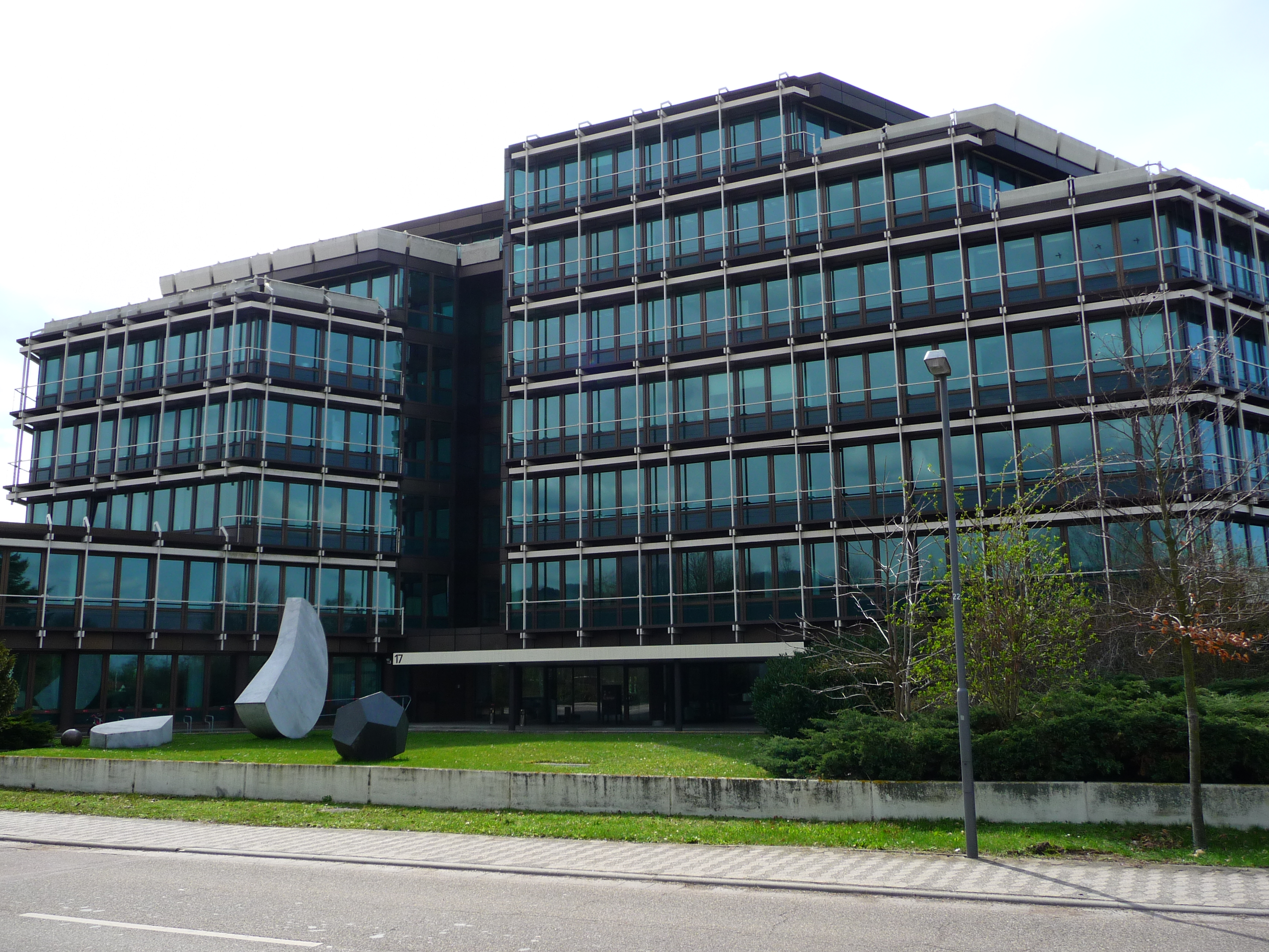 Springer Science+Business Media S.A. im Neuenheimer Feld in Heidelberg (Baden-Württemberg, Deutschland)